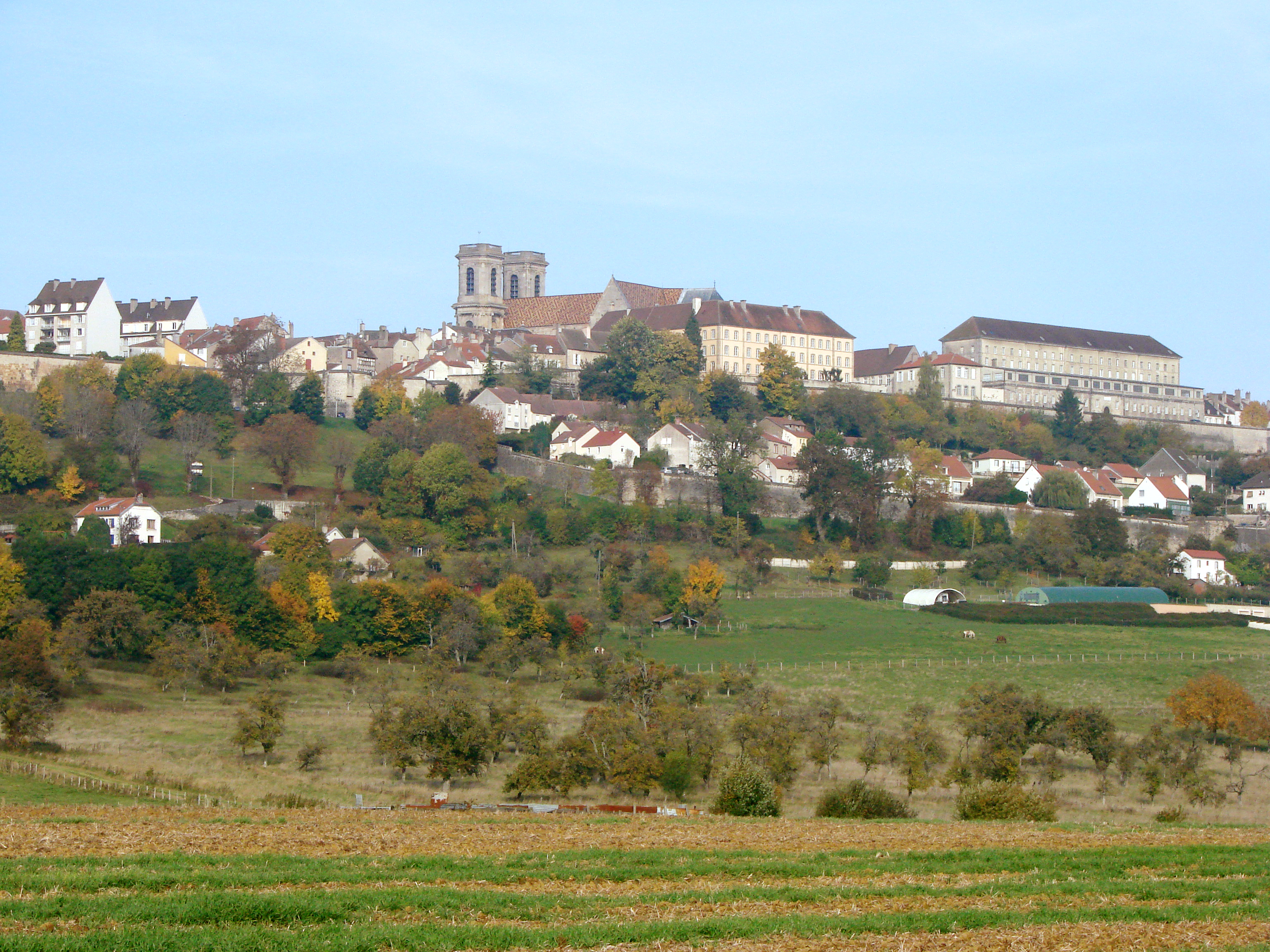 Vue de la ville de Langres (Haute-Marne, France).